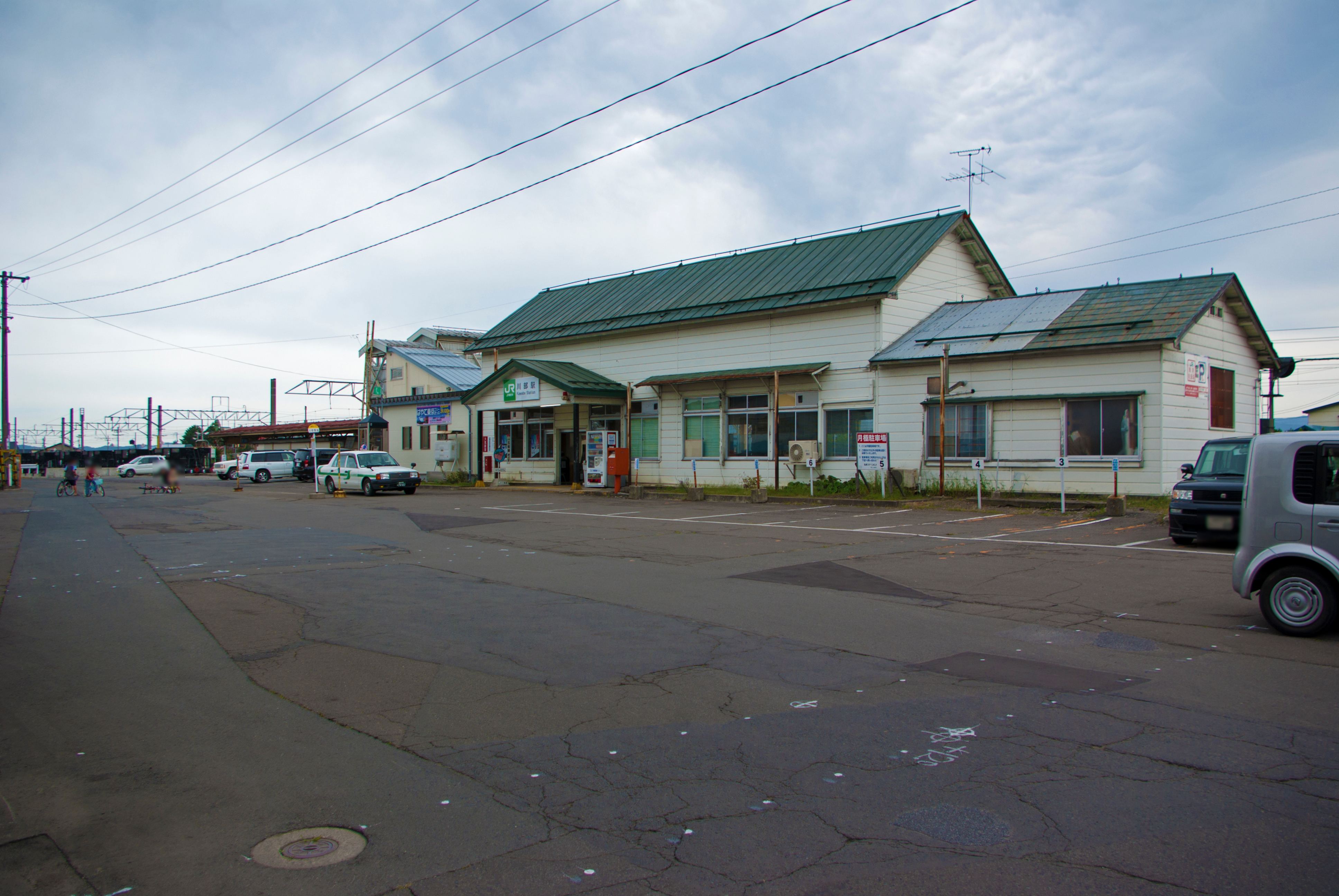 東日本旅客鉄道奥羽本線、五能線川部駅